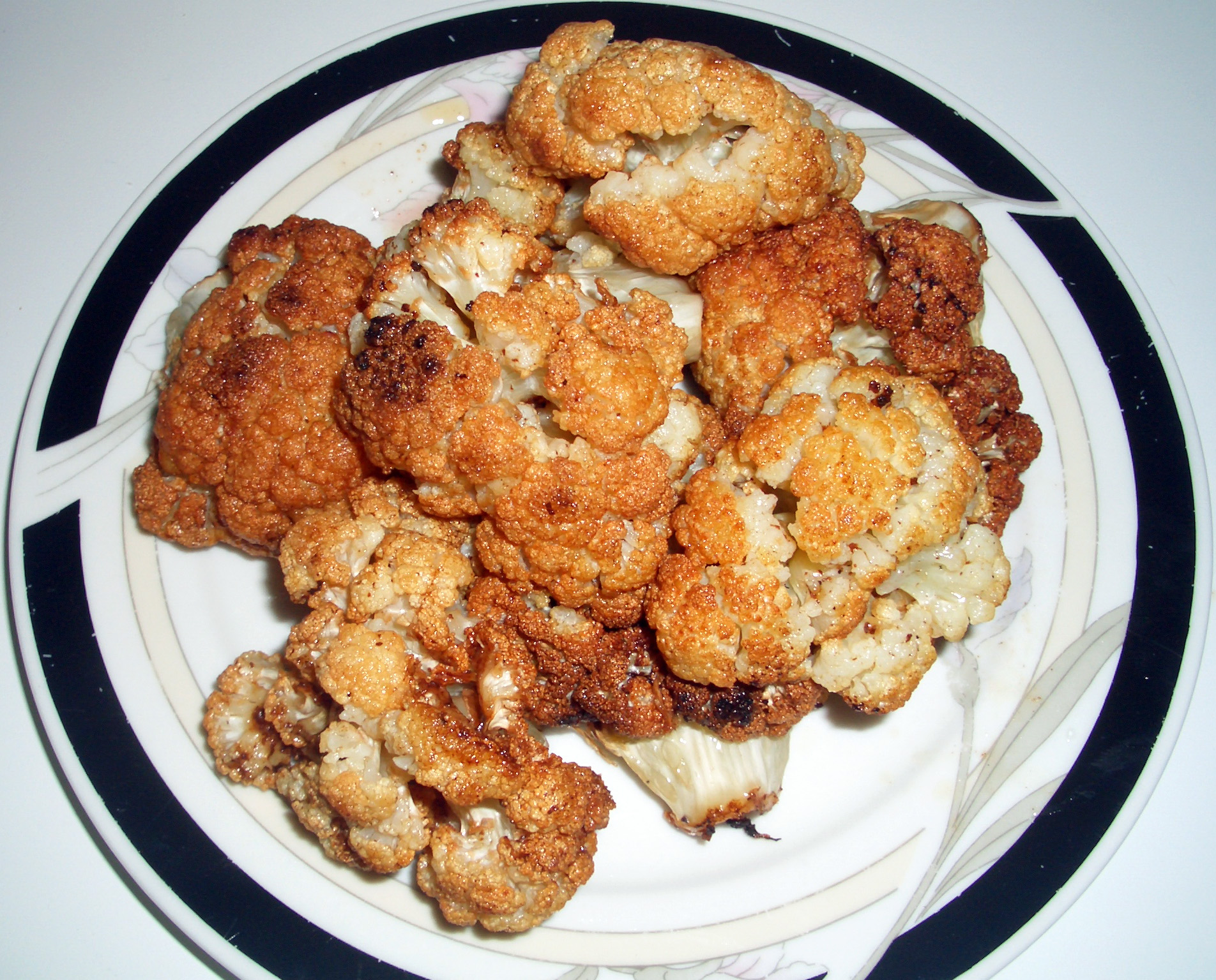 Zahra melah